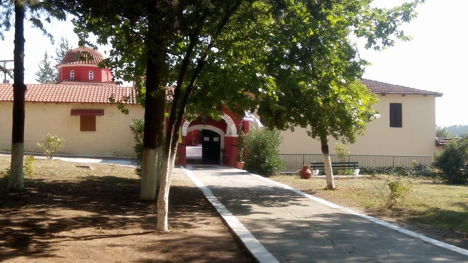 Ido: εξωτερική άποψη της μονής